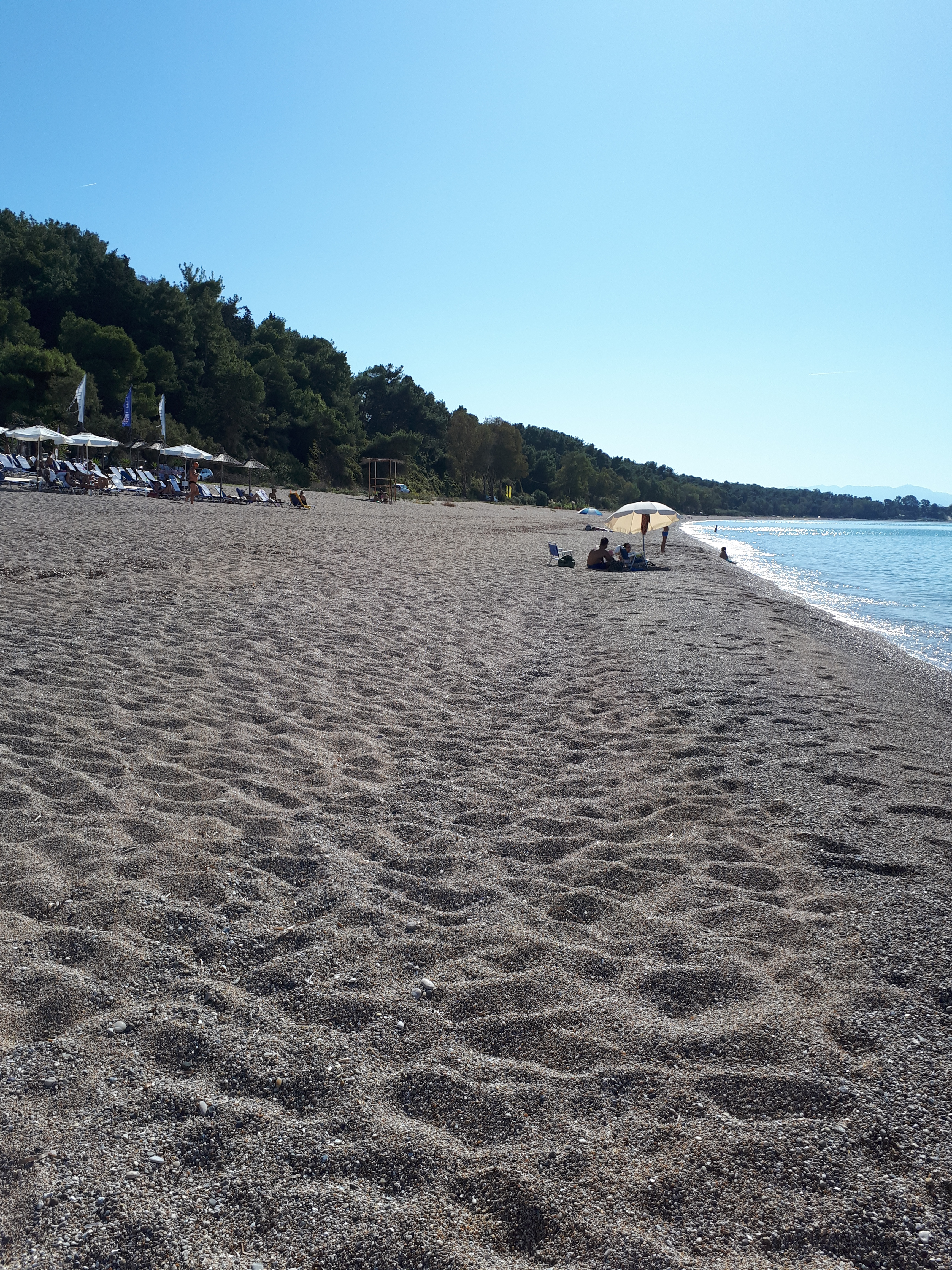 Παραλία Μονολιθίου, στο αριστερό άκρο διακρίνεται μέρος του Αισθητικού Δάσους Μονολιθίου